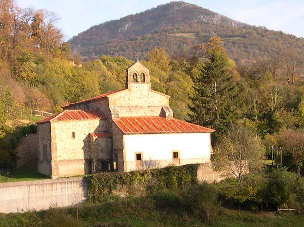 Ilesia de Santa María, en Tañes.